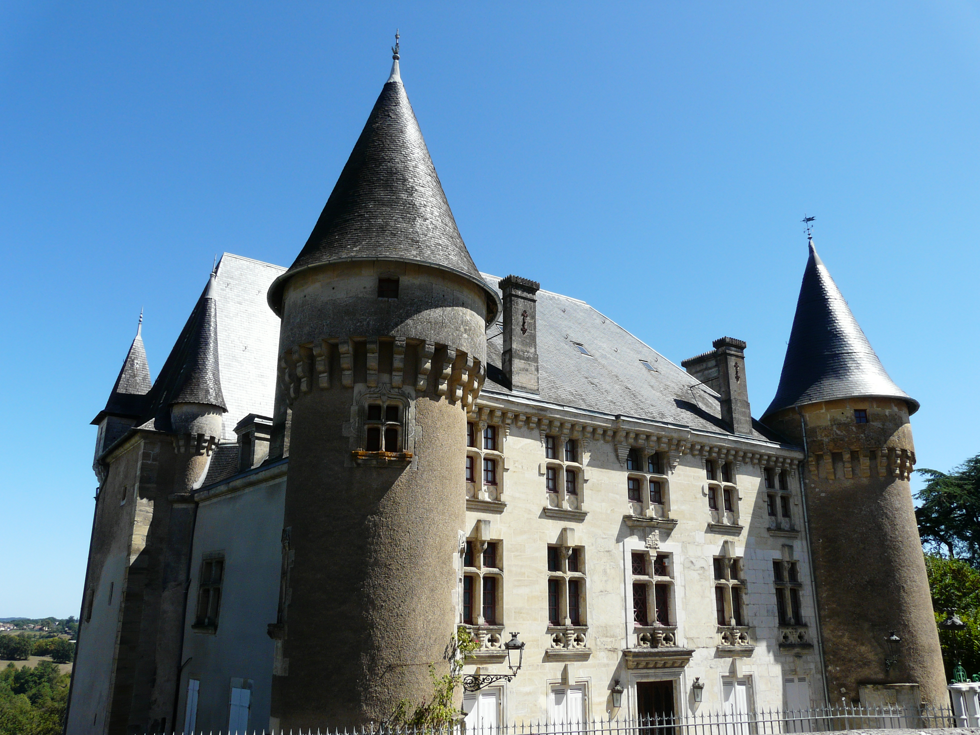 Le château de Vaucocour, Thiviers, Dordogne, France